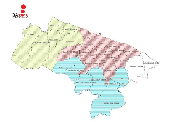 Immagine dell'Area metropolitana di Bari